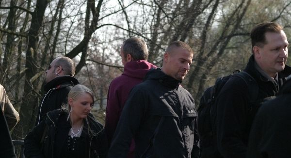 Der NPD-Abgeordnete im Landtag von Mecklenburg-Vorpommern Birger Lüssow (mitte) wird mit anderen NPD Delegierten unter Polizeischutz zum NPD-Bundesparteitag eskortiert.